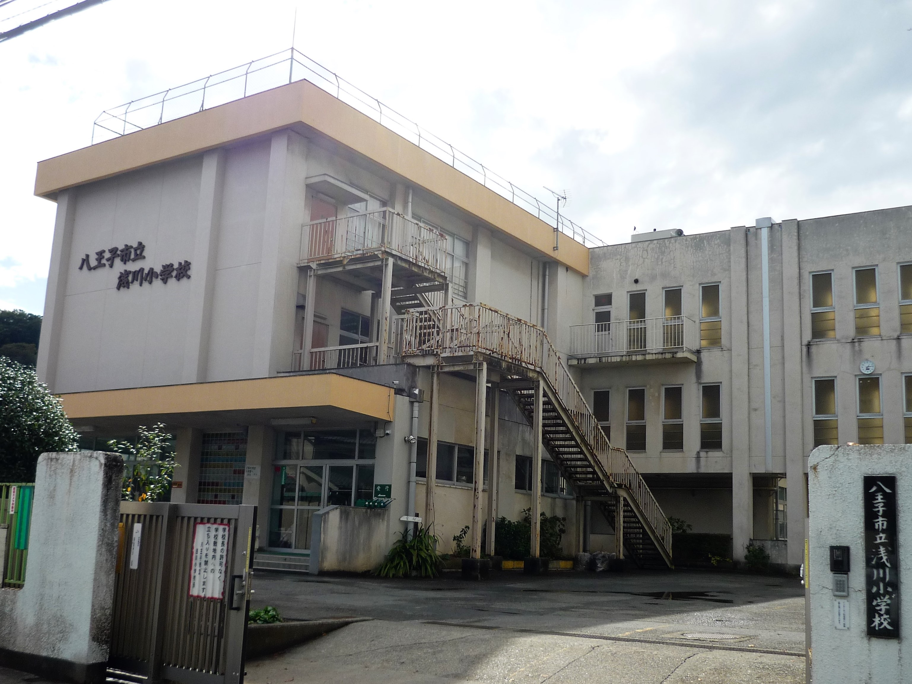 八王子市立浅川小学校